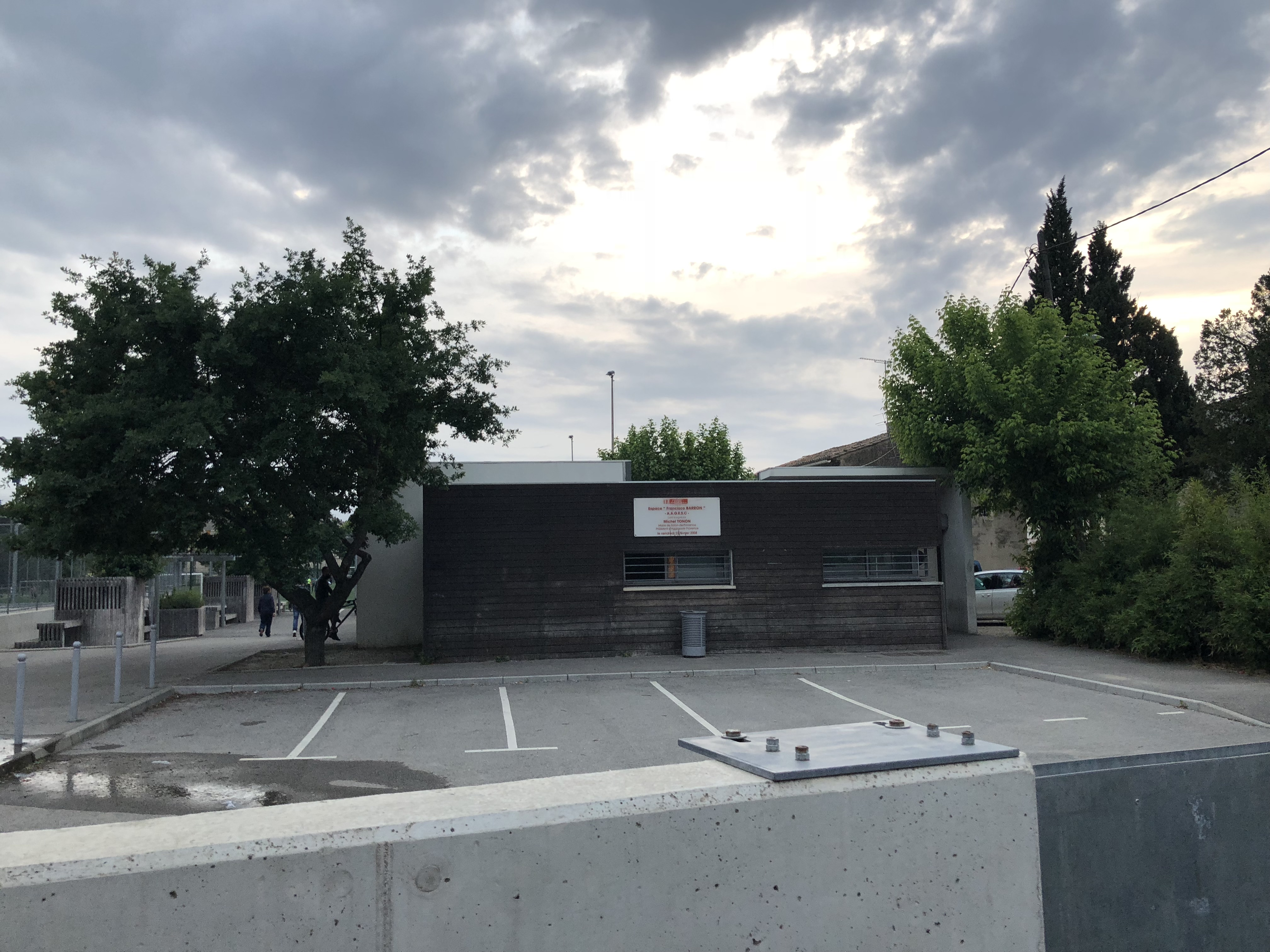 OPL de Canourgues à Salon de Provence: espace Franscisco Barron dit GOSL ou Archipel